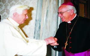 Dom Irineu Danelon,Bispo da Diocese de Lins (1988-2015) na direita e Papa Bento XVI (2005-2013) do lado esquerdo.